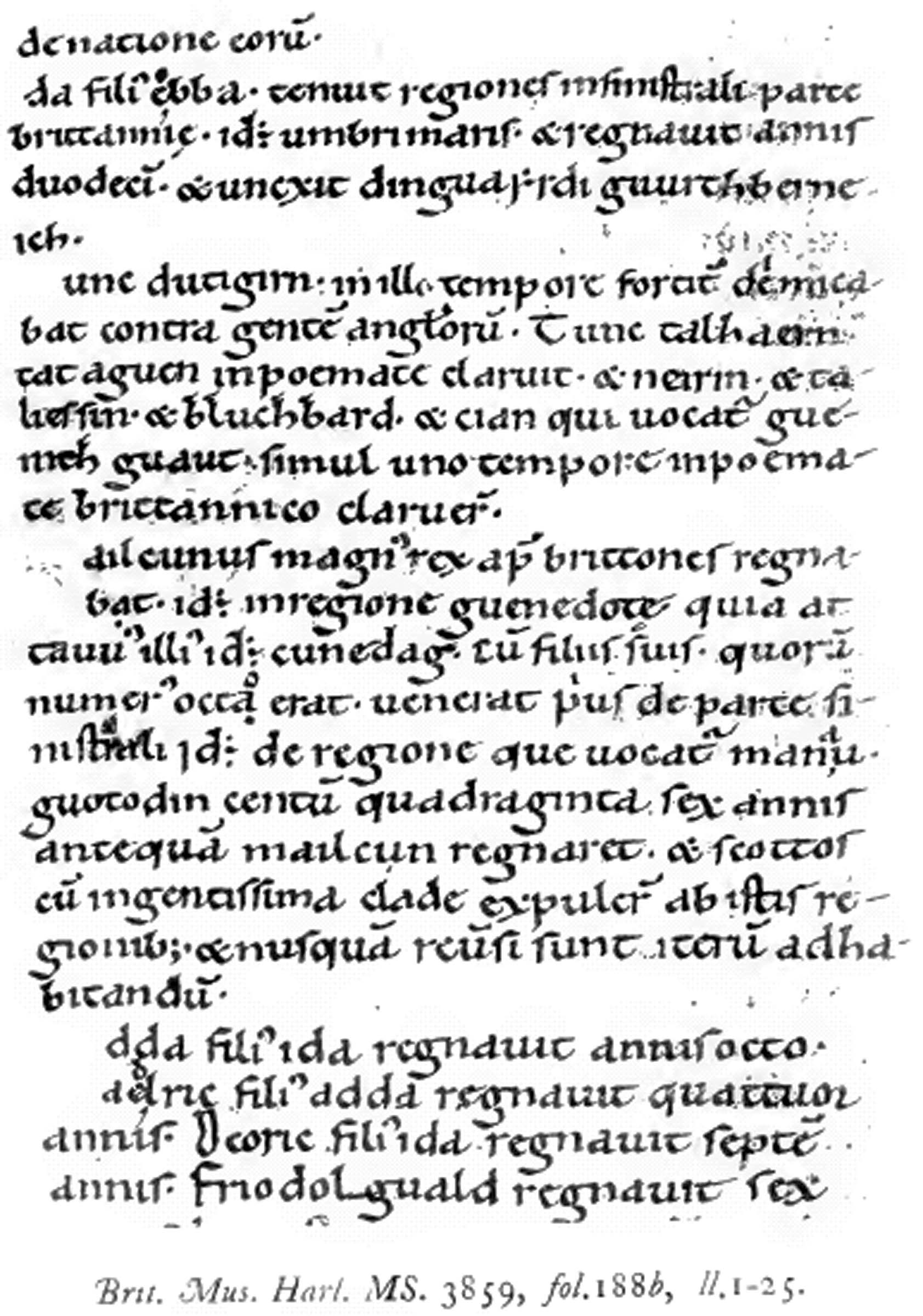 Harleian MS. 3859, fol.188b, ll.1–25.